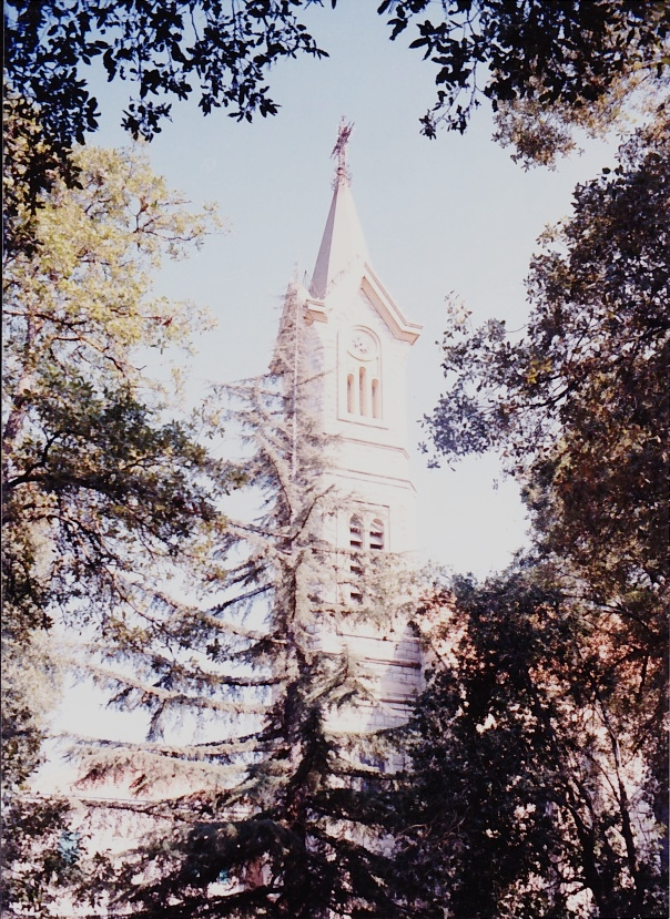 Chapelle du Sanatorium de Bhannes où repose le corps du Père Henri Heudre